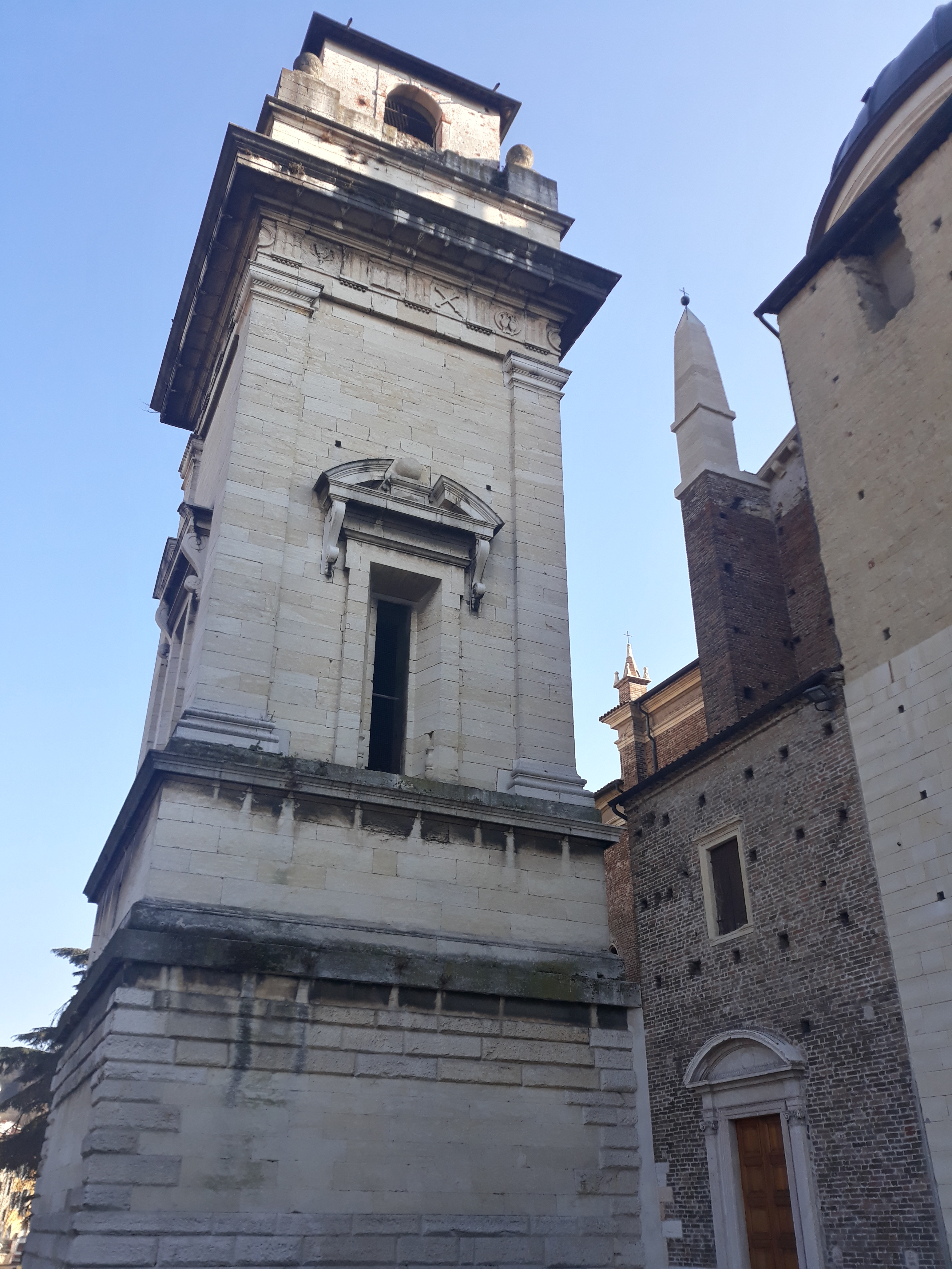 Campanile chiesa san Giorgio in Braida a Verona